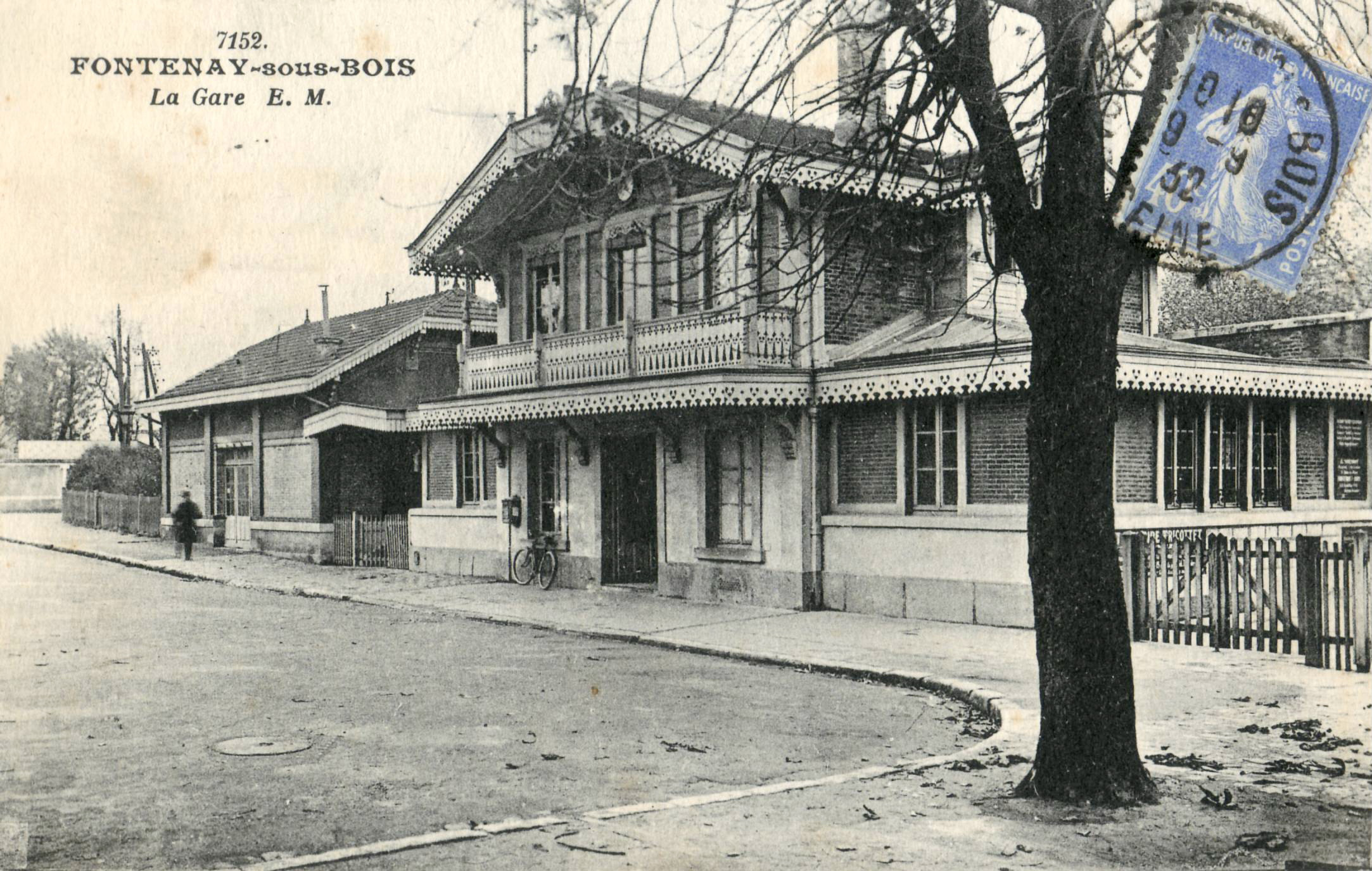 Carte postale ancienne éditée par EM, n°7152 :FONTENAY-SOUS-BOIS - La Gare